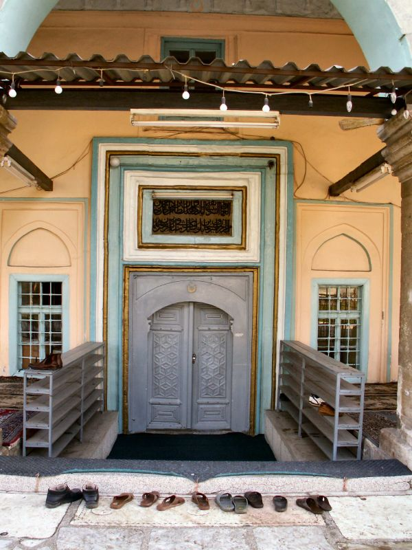 Bit Pazar Mosque 01